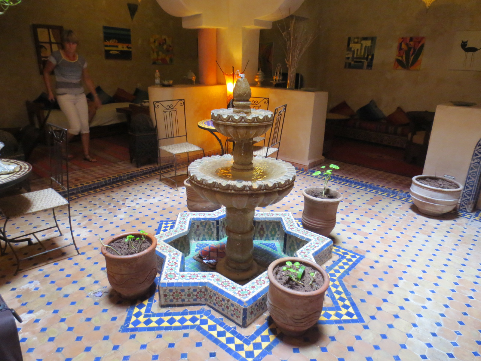 Riad Essaouira au Maroc